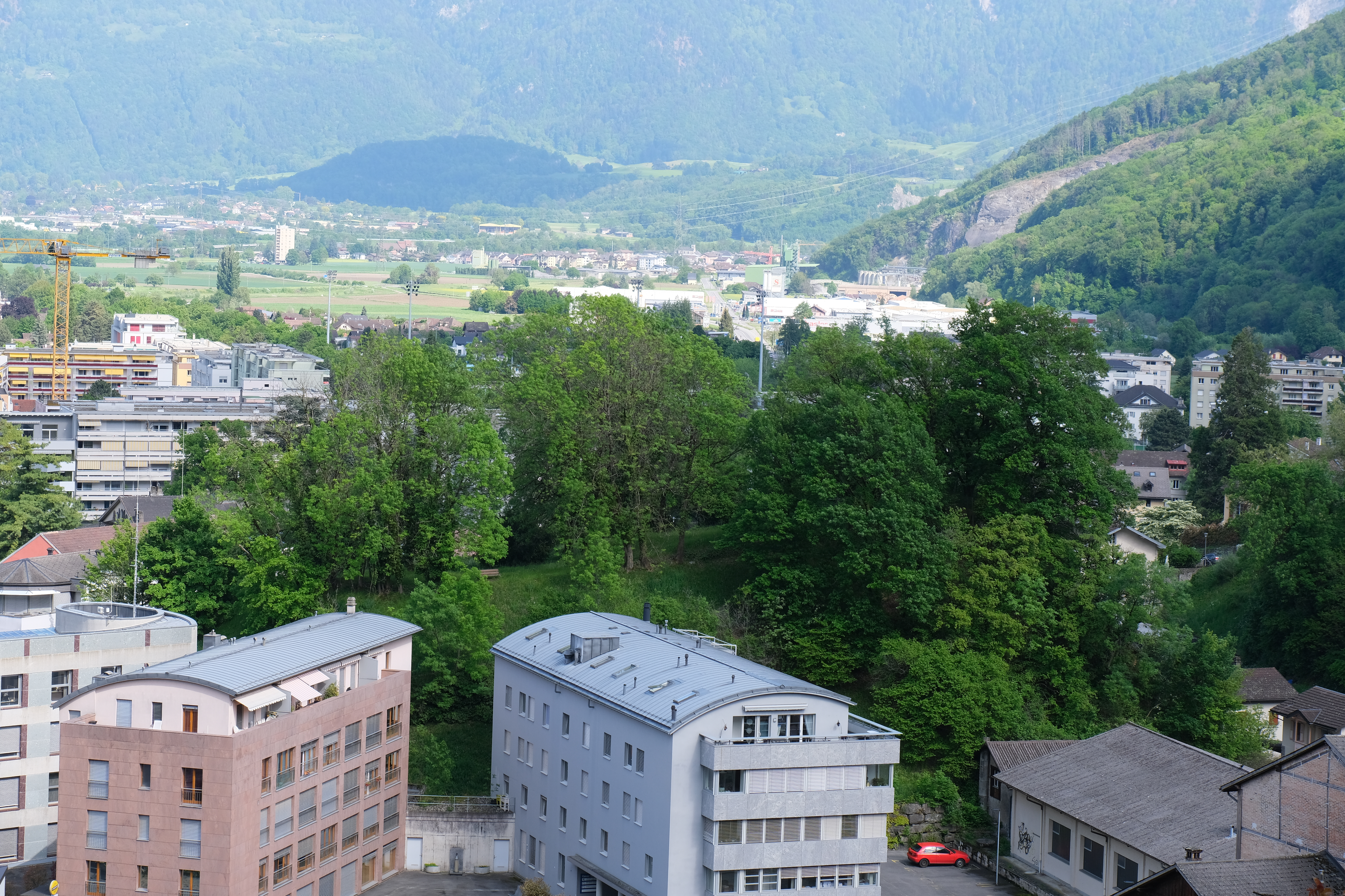 La colline du Château-Vieux à Monthey en 2020.